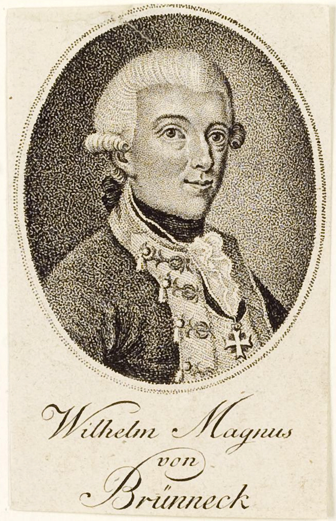 Bildnis Wilhelm Magnus von Brünneck